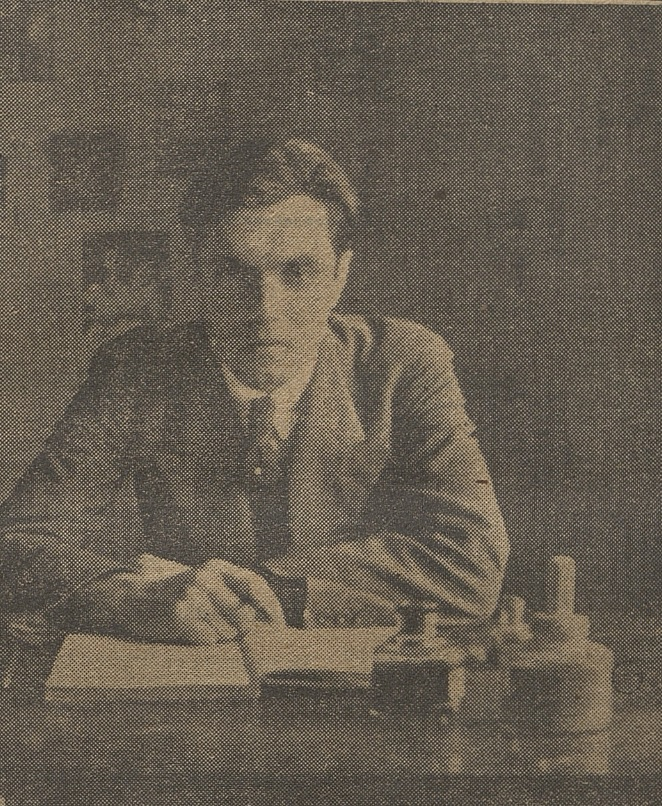 Santiago Labarca en 1920. Santiago Labarca Labarca (Chillán, 1 de marzo de 1893-1968) fue un político e ingeniero civil chileno, diputado nacional por Santiago en tres períodos, luego ministro de Educación y de Hacienda de Chile.